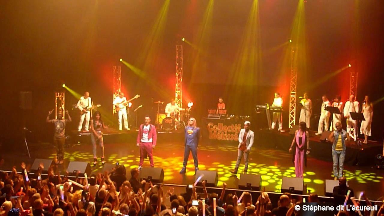 Collectif Métissé à l'Olympia à Paris le 31 octobre 2014